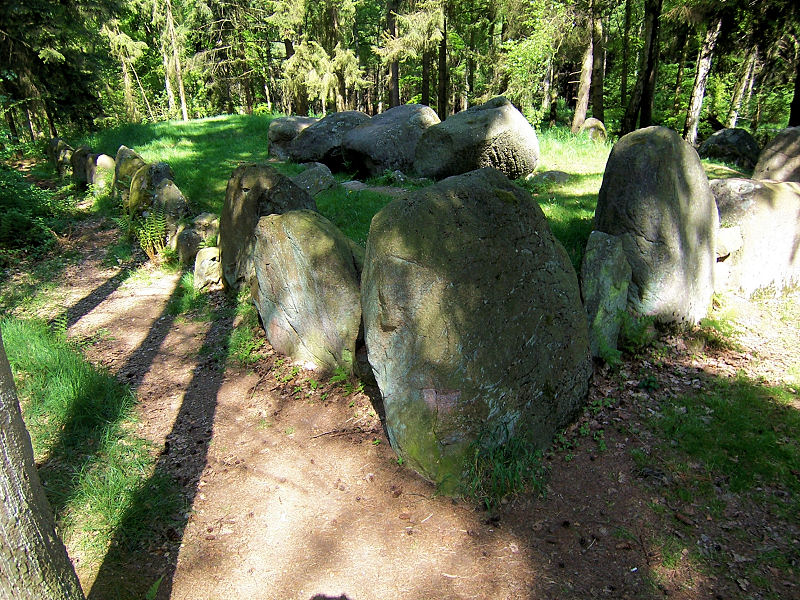 Großsteingrab "Everstorf Süd 1" (Riesengrab), Hünenbett bei Grevesmühlen in der Südgruppe der Großsteingräber im Everstorfer Forst. Sprockhoff-Nummer: 311[1][2].